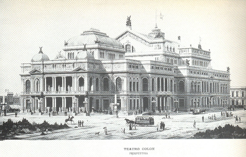 Proyecto original del Teatro Colón en Buenos Aires, acuarela del arquitecto Francesco Tamburini.